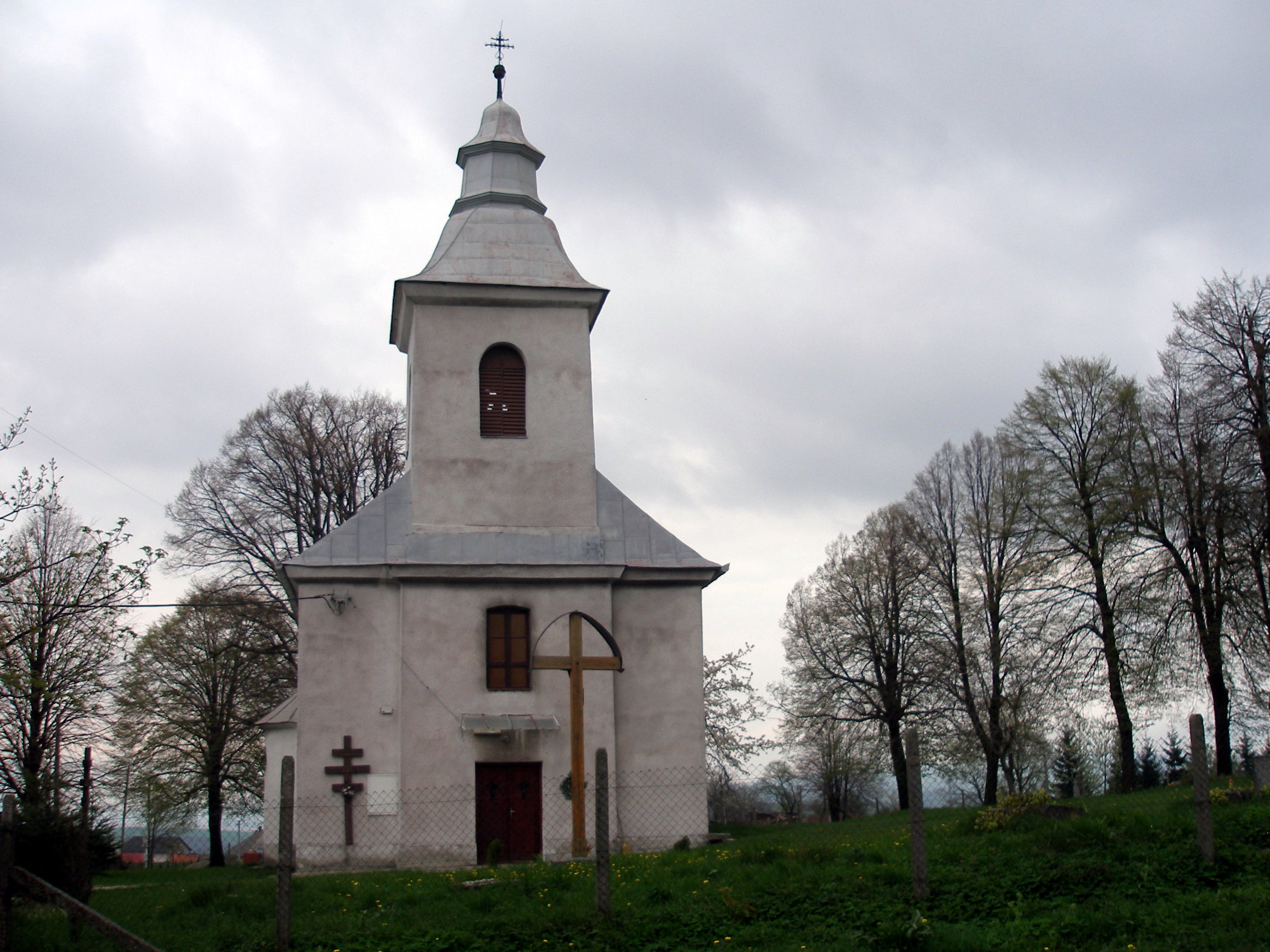 Obec Geraltov okres Prešov región Šariš